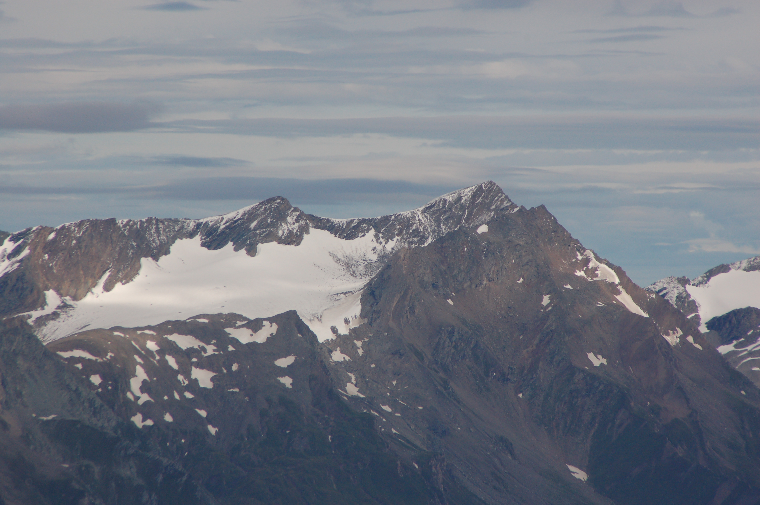 Blick vom Debantgrat (Schobergruppe) auf den Muntanitz und den Gradötzkees. This file shows the National Park Hohe Tauern in Austria.